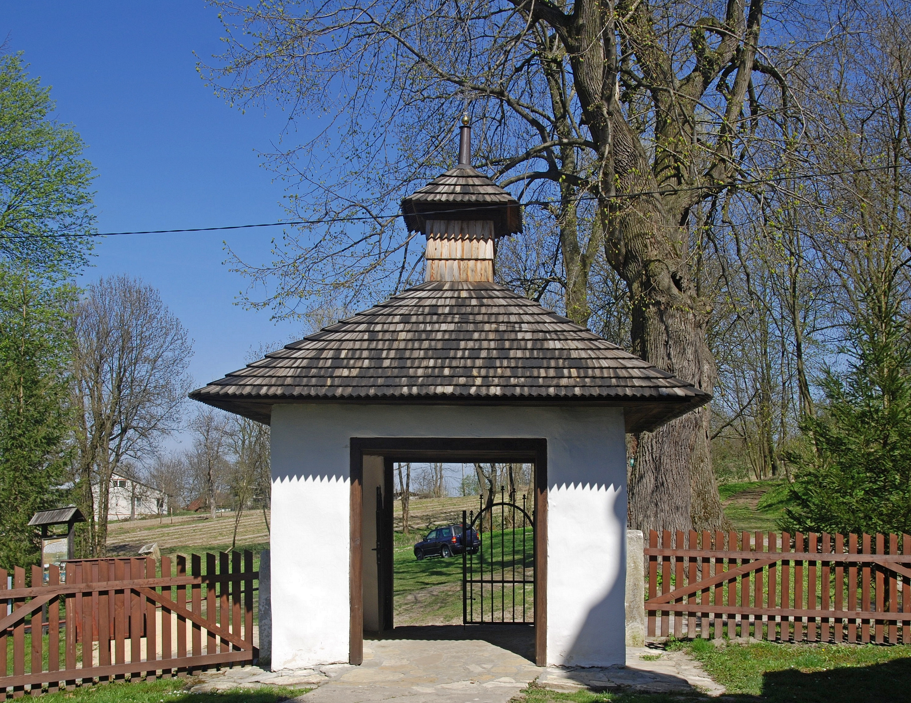 wieś Hrebenne, cerkiew św. Mikołaja Wikidata has entry Q9187912 with data related to this item.